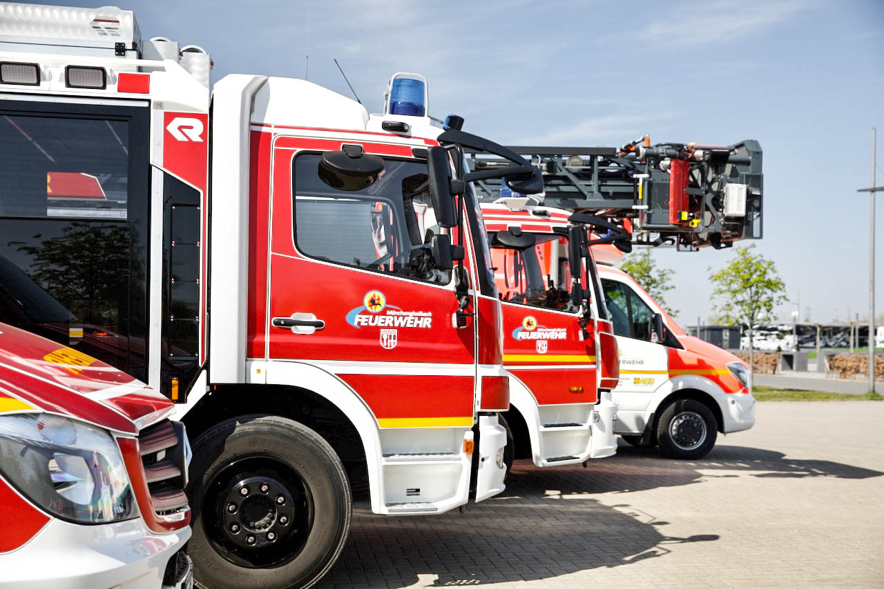 Grundeinheit #FWMG